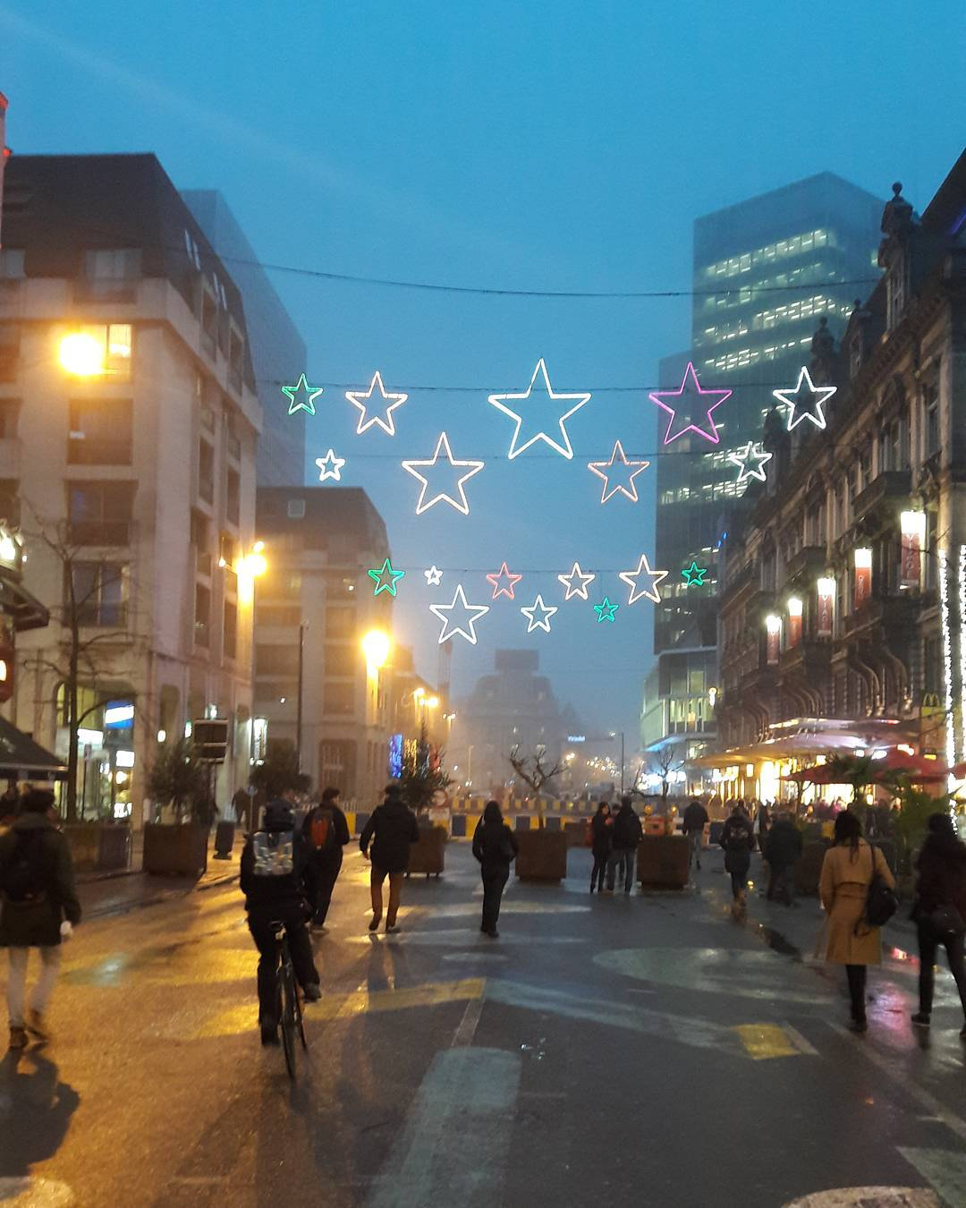 Een met kerstlicht versierde Anspachlaan bij valavond, in de periode van Kerstmis 2017 This photo of immovable heritage has been taken in the Brussels Capital Region